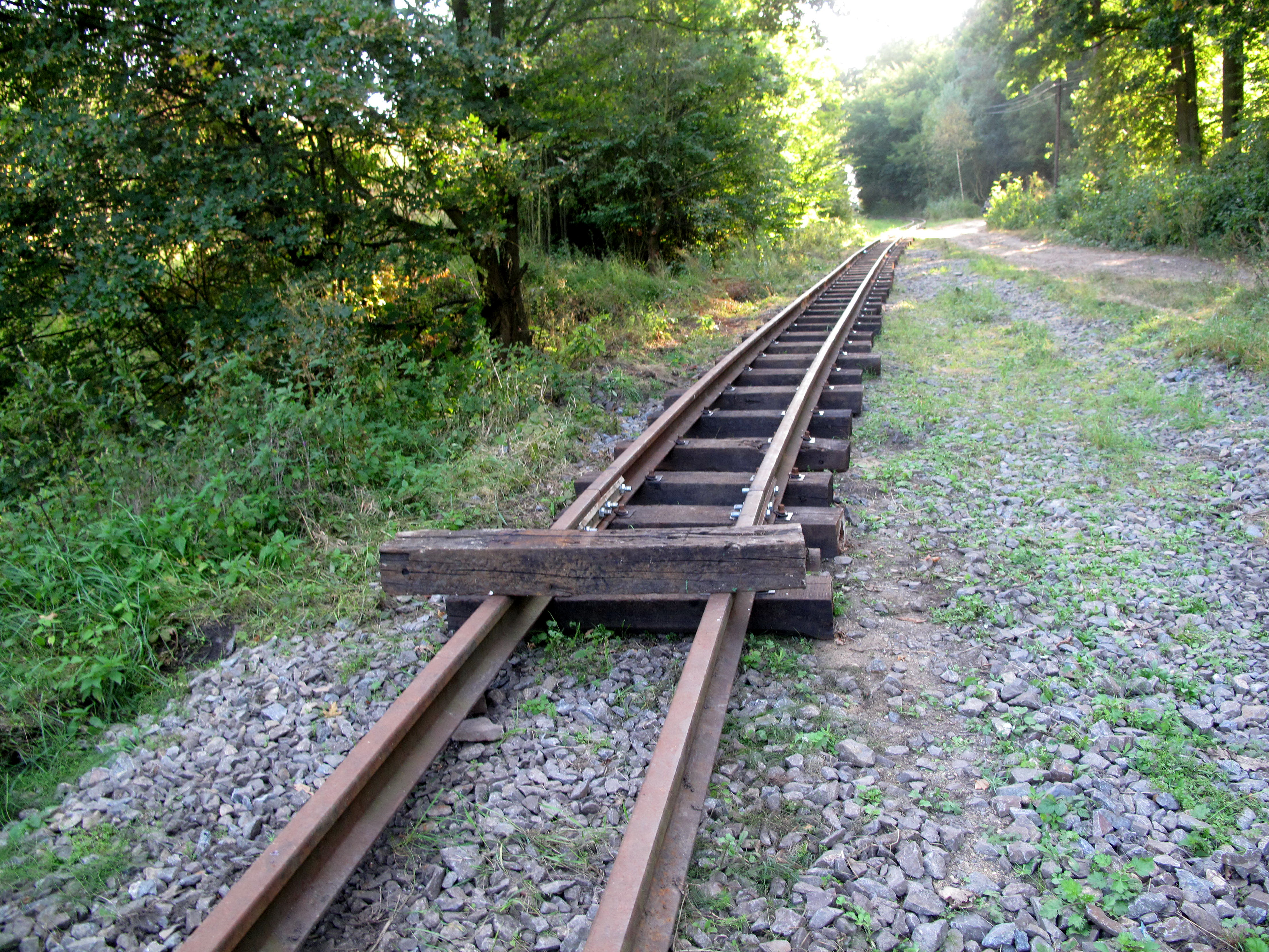 Muzeum průmyslových železnic, úzkokolejka